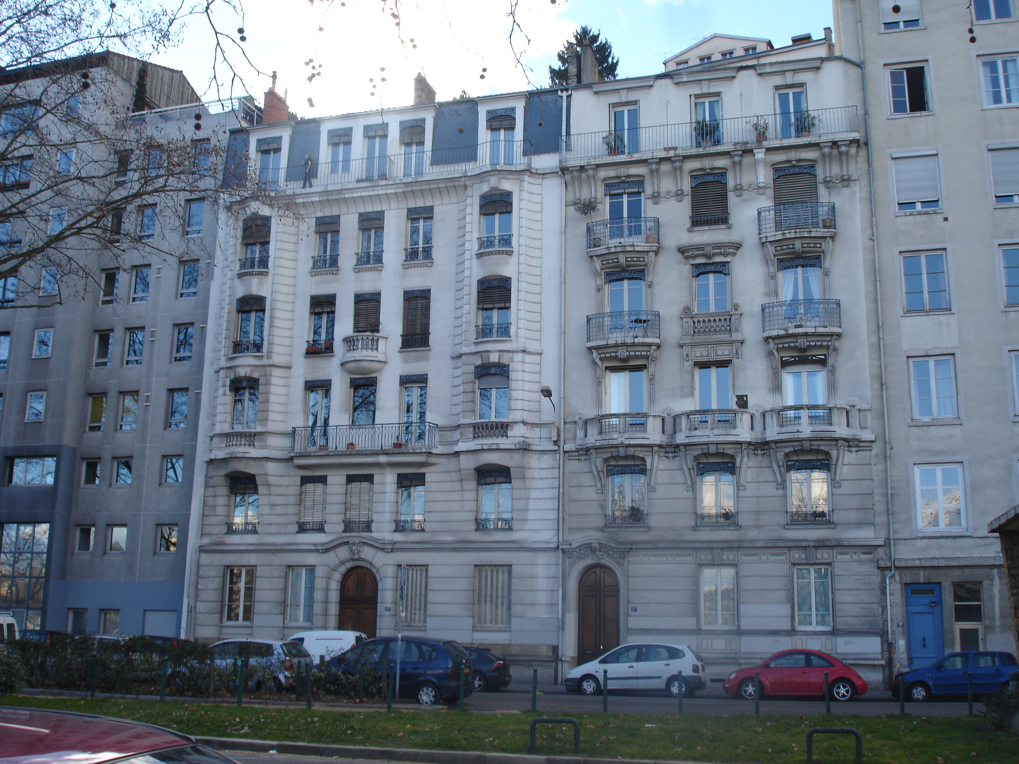 Lyon : vue du quai d'Herbouville dans le quartier Saint-Clair